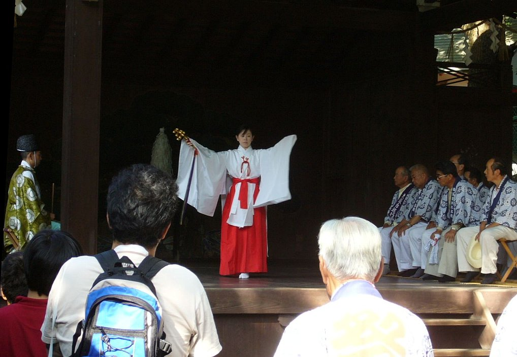 巫女神楽。服部住吉神社で秋祭りの宮入にあたって催行されたもの。